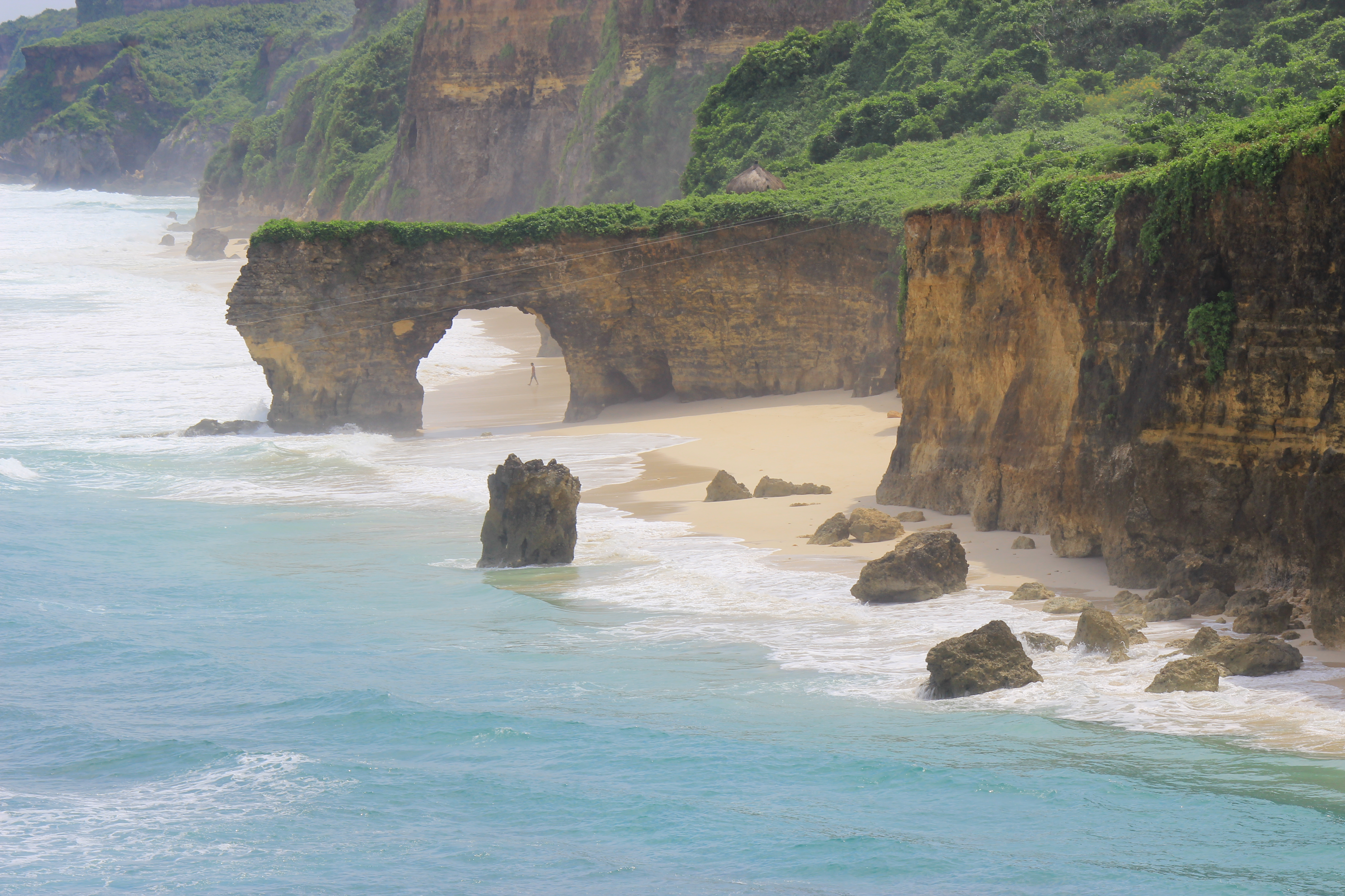 Pantai Mbawana atau Pantai Batu Bolong terletak di Kec. Kodi, Sumba Barat Daya, Nusa Tenggara Timur, Indonesia. Pemandangan dari atas pantai dapat dilihat dari Tanjung Mareha.